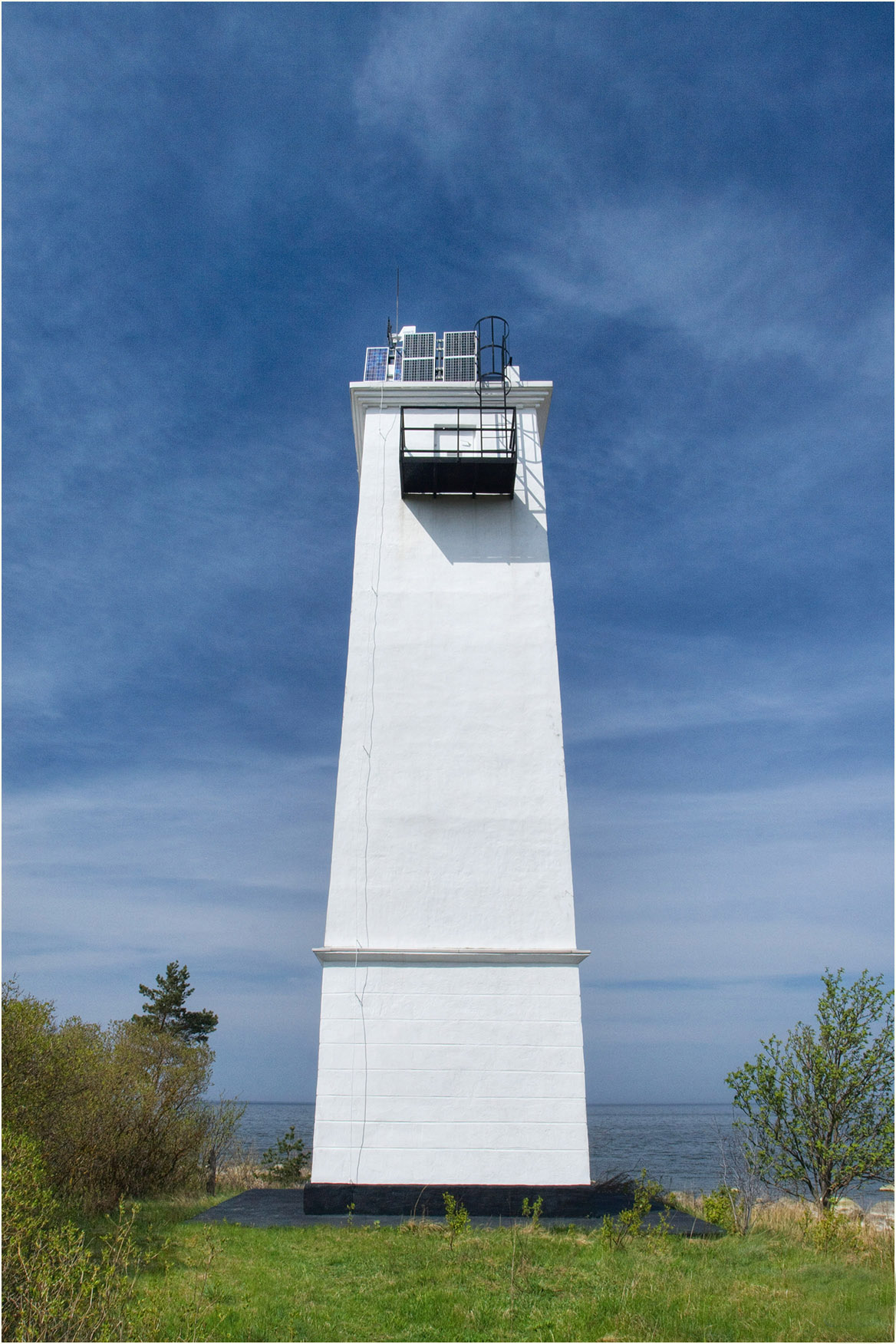 Letipea tuletorn